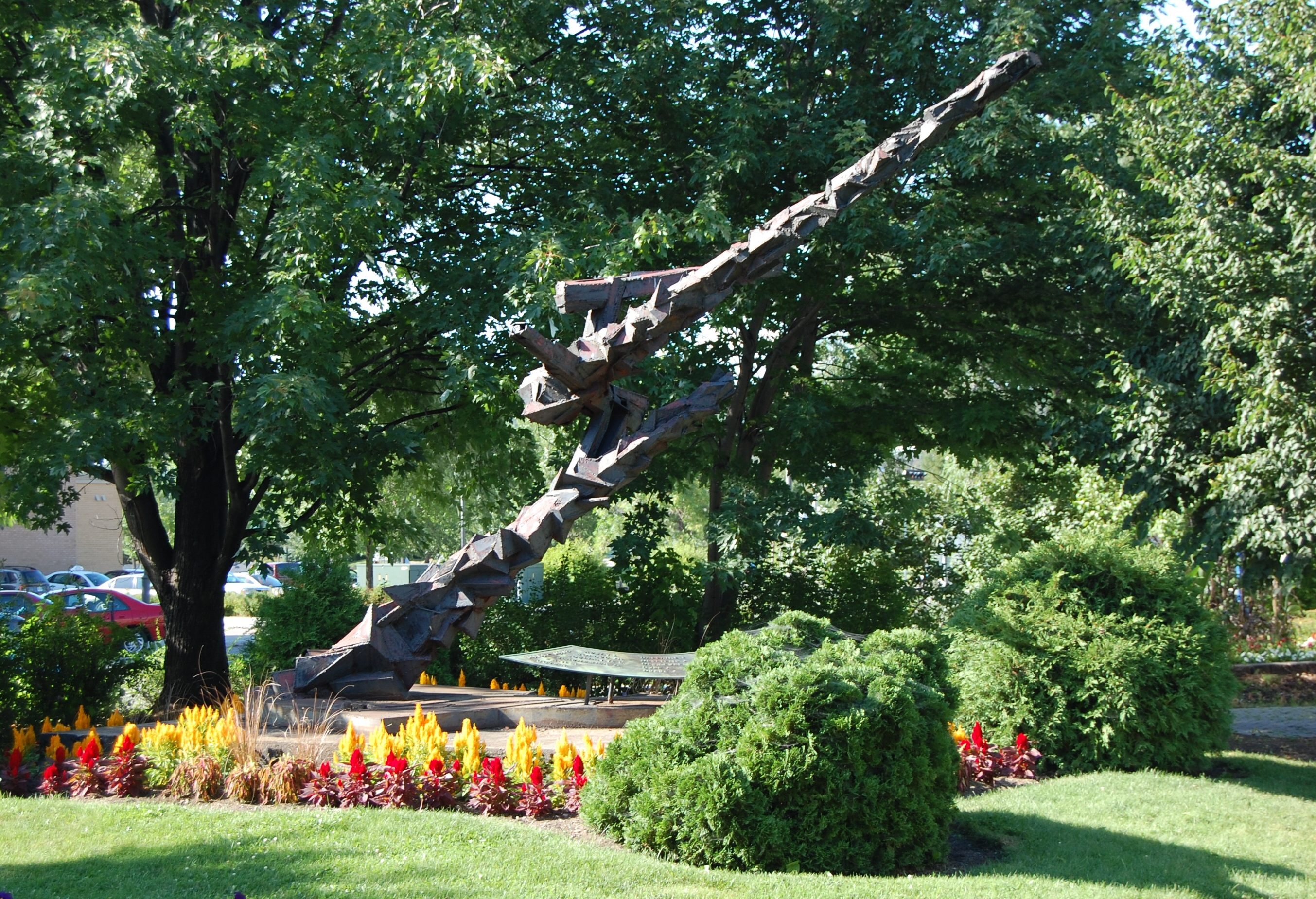 Cénotaphe de Chicoutimi par Armand Vaillancourt